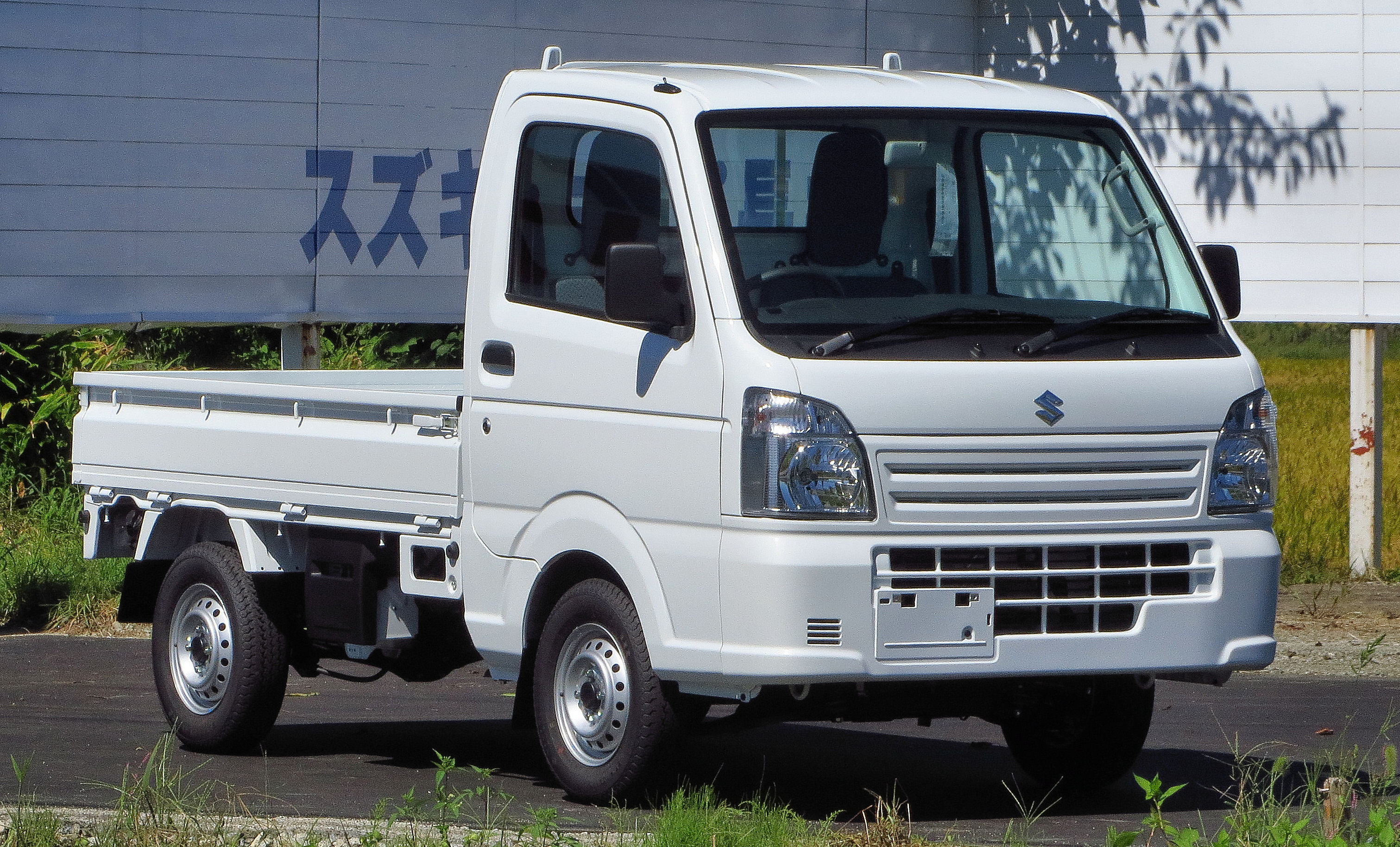 スズキ キャリイトラック KC エアコン・パワステ パートタイム4WD 5速MT